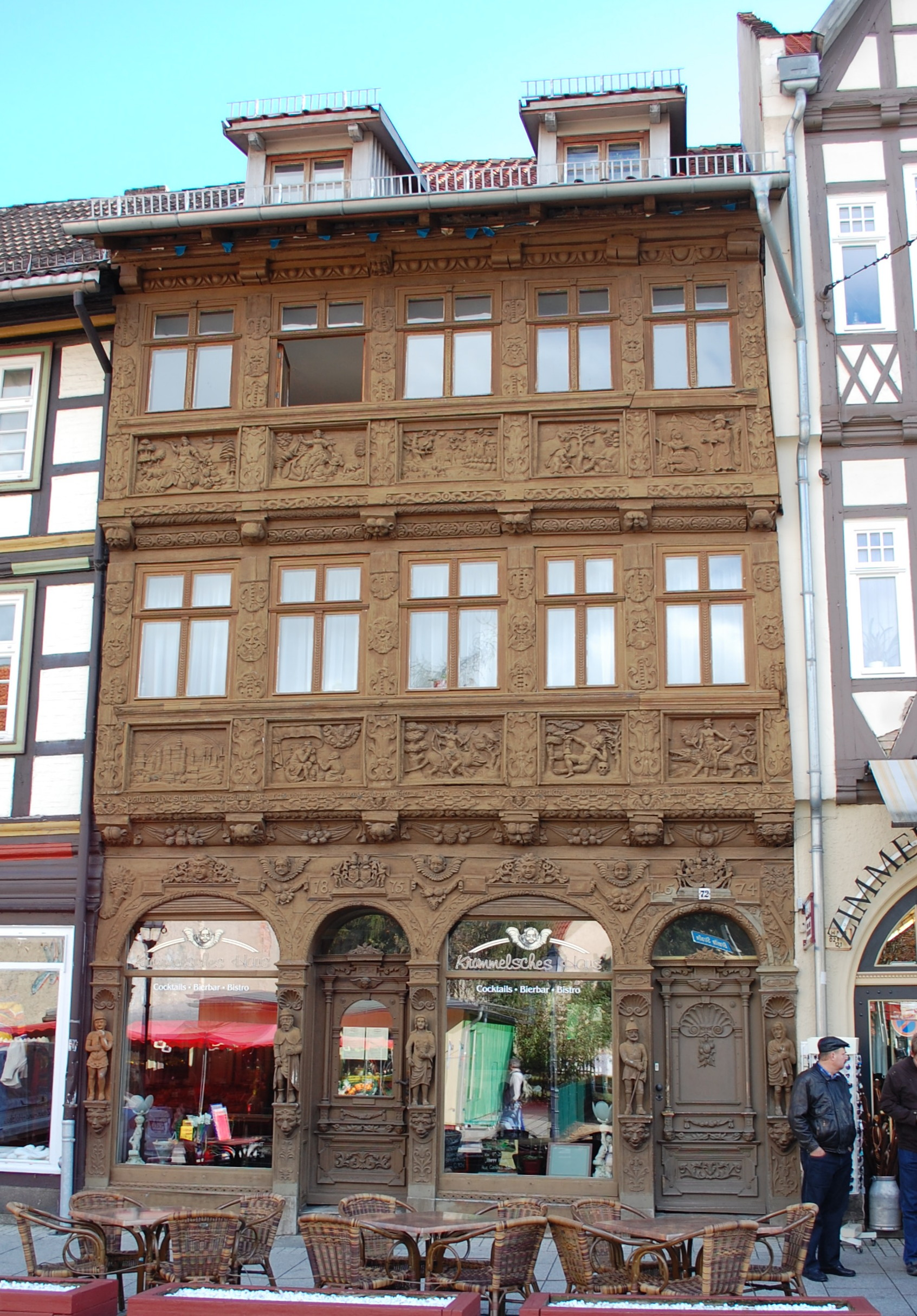 Krummelsches Haus in Wernigerode